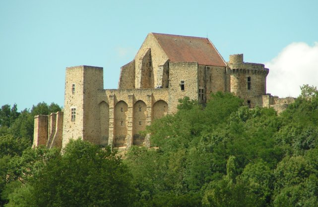 Château de la Madeleine vu depuis Chevreuse